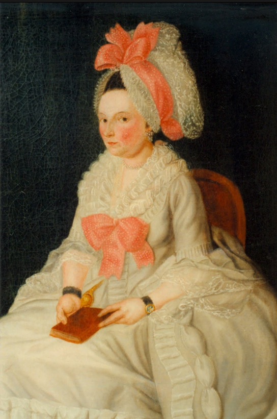 portret van Cornelia Braet, echtgenote van dr. Fredericus Agustinus Honndorff Block, arts te Schoonhoven, ouders van Pauline Maria Hondorff Block, echtgenote van Salomon Reijnders Bisdom, burgemeester van Haastrecht